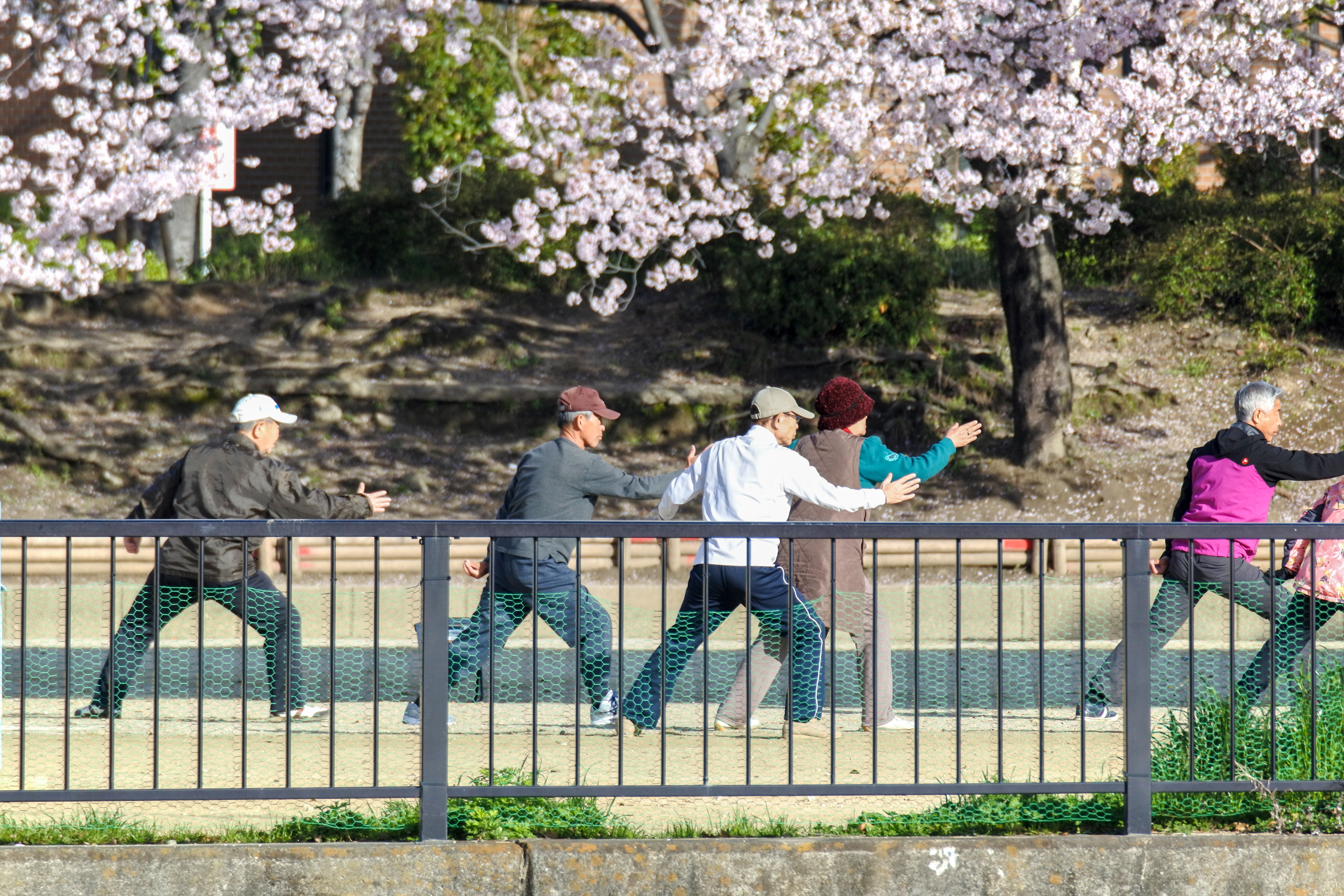 Apr 6, 2016 at 7:27, Osaka 大川端 Hexagonal nets